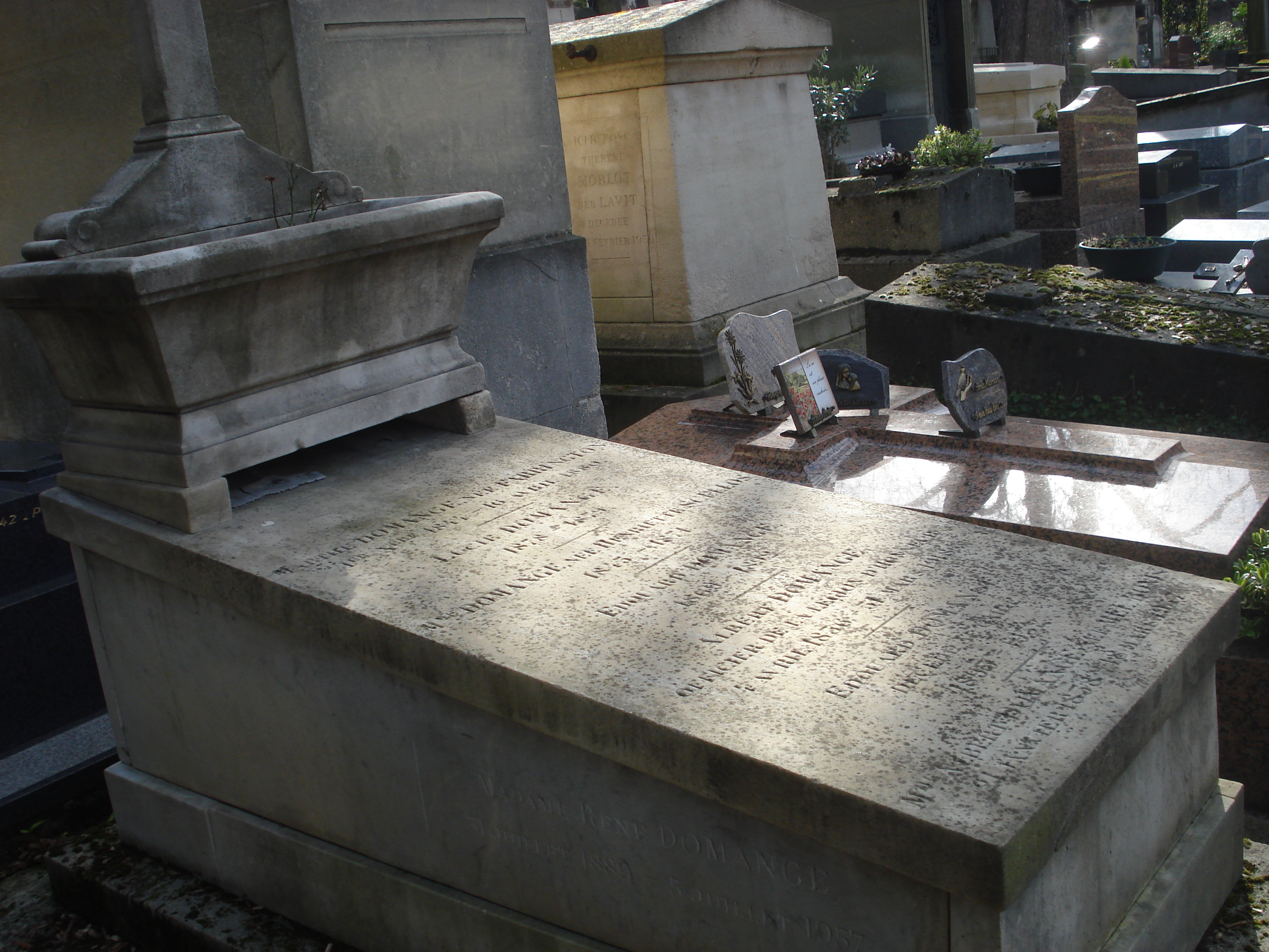 BONIS Mélanie, dite Mel BONIS, (1858-1937), compositrice, née le 21 janvier 1858 à Paris, décédée le 18 mars 1937 à Sarcelles. Elle repose avec la famille de son époux, l'industriel Albert DOMANGE. Cimetière Montmartre, 24e division